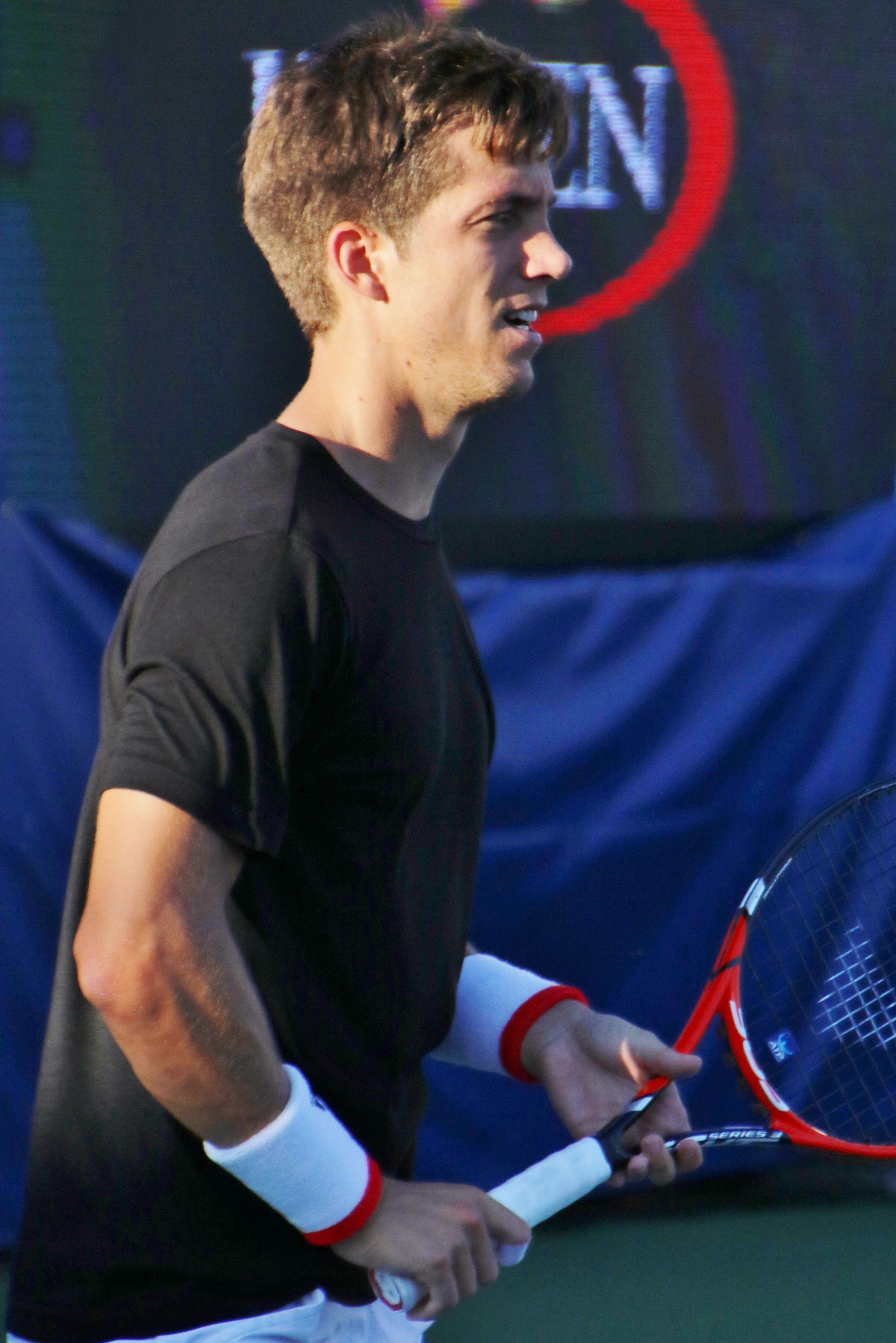 Bedene US16 (12)